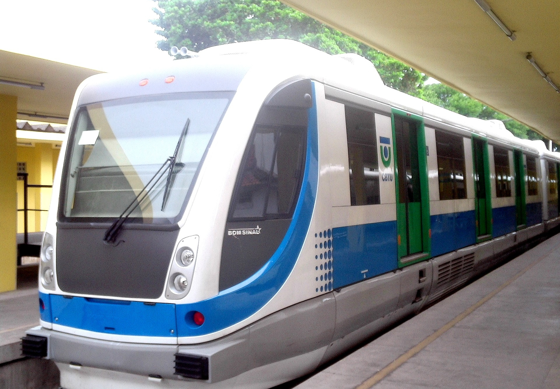 TUDH modelo Mobile 3 fabricado pela Bom Sinal na cidade de Barbalha (Ceará) em operação em Maceio (Alagoas)